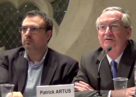 Premier colloque organisé par La Fabrique de l'Industrie sur la désindustrialisation en France